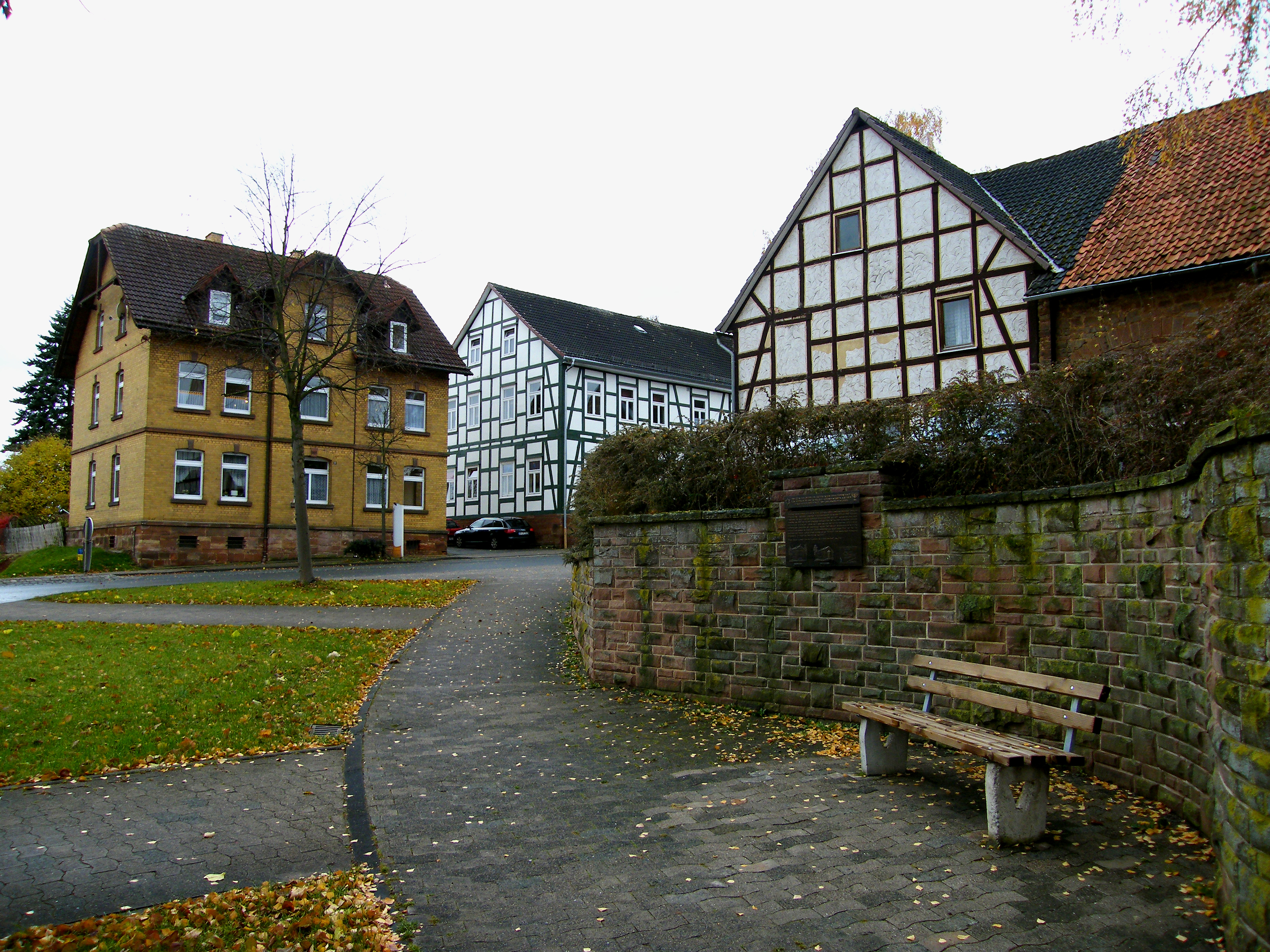 Standort der ehem. Synagoge in Sachsenhausen - Ansicht Standort und heutige Straßenführung - Blickrichtung Wildunger Straße